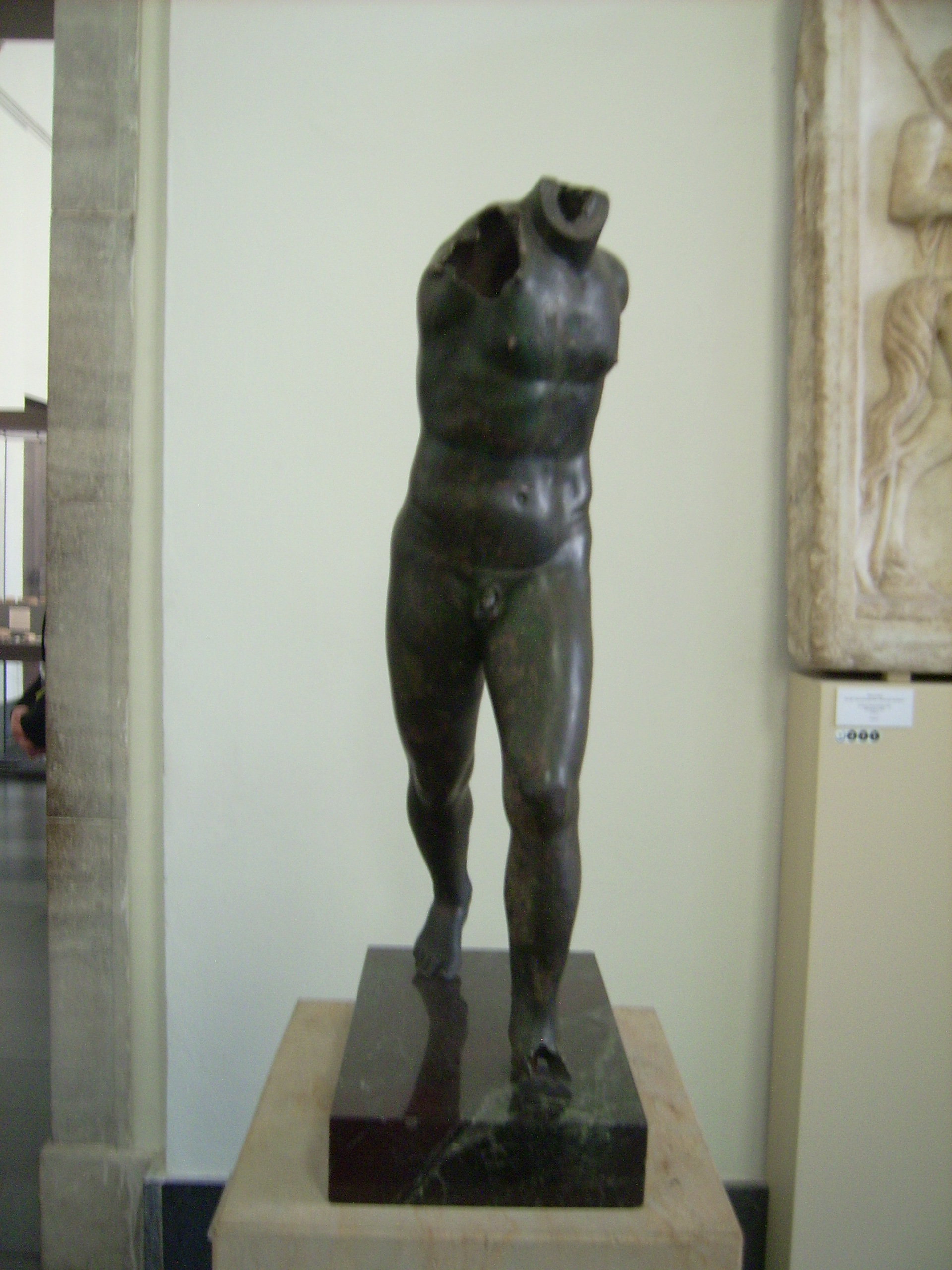 Bronzestatue eines laufenden Jünglings; gefunden in Jumilla in Spanien, 1. Hälfte des 2. Jahrhunderts; Antikensammlung Berlin/Pergamonmuseum